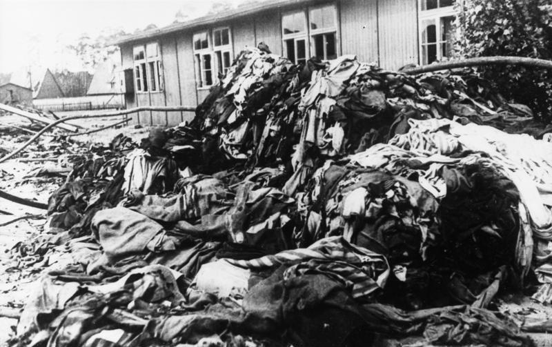 Sachsenhausen, Konzentrationslager Zentralbild 13.12.1955 Kleidung umgebrachter Häftlinge im Nazi-Konzentrationslager Sachsenhausen bei Oranienburg.